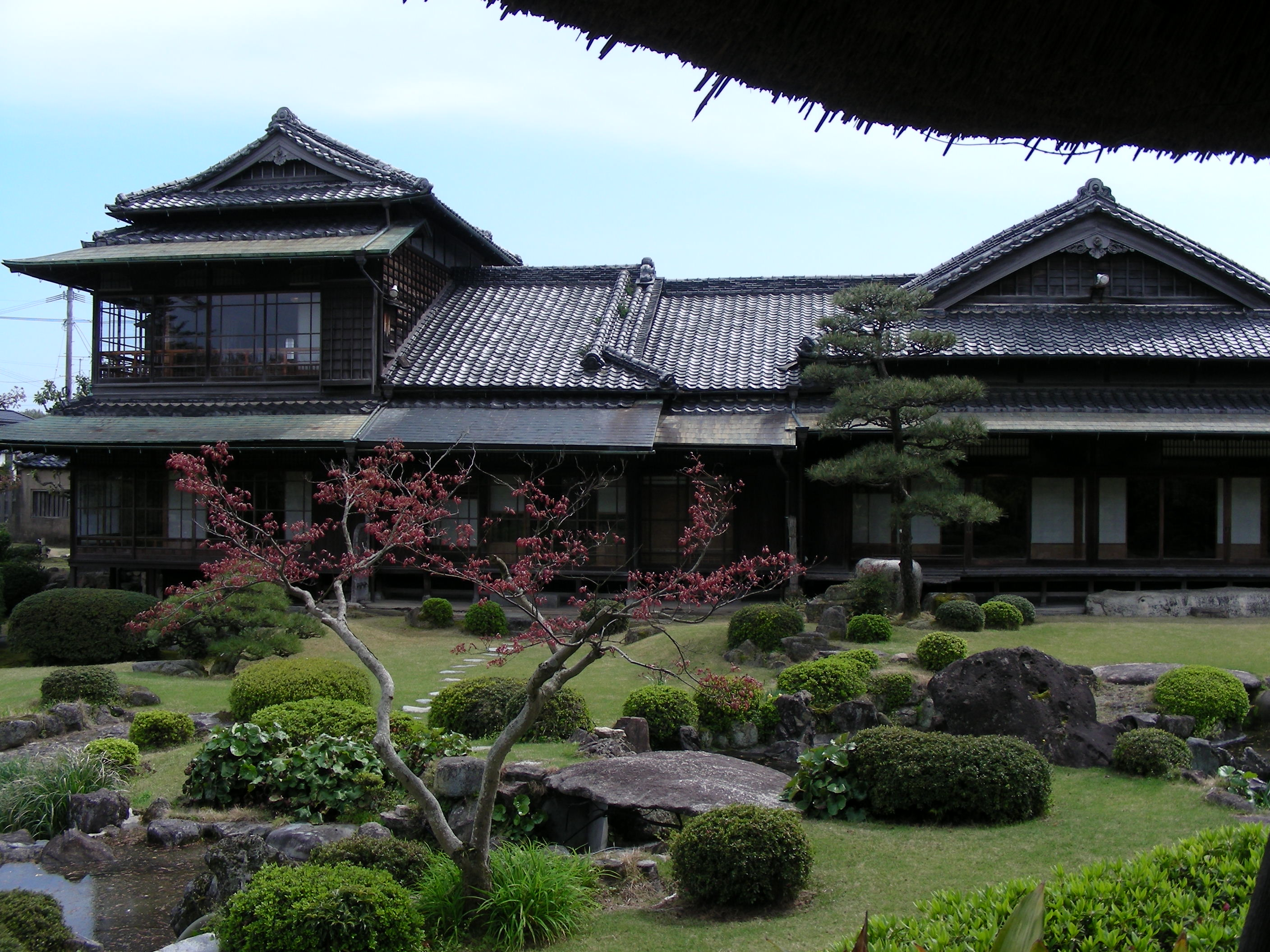 福岡県飯塚市幸袋の旧伊藤伝右衛門邸。2014年4月撮影。